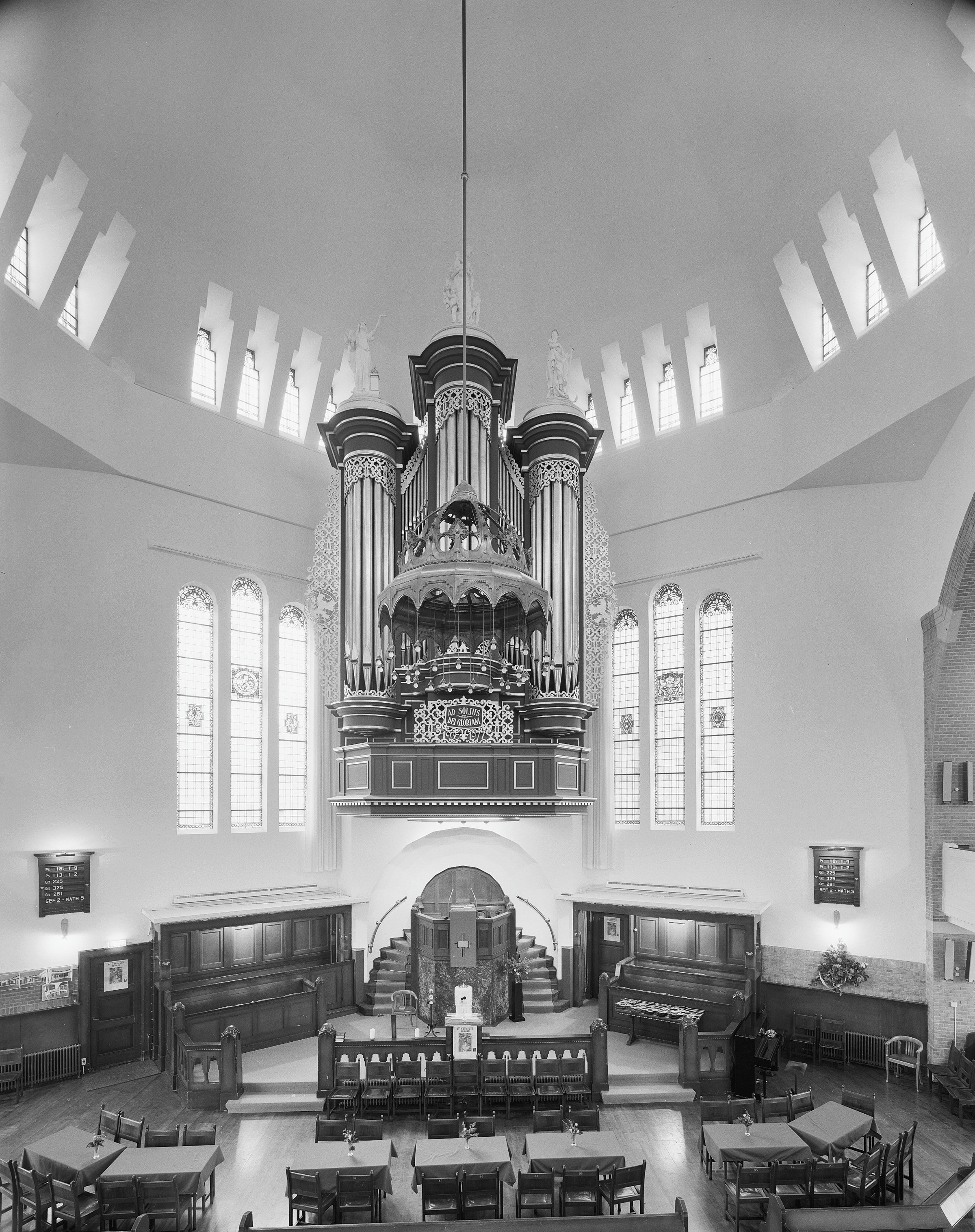 Koepelkerk: Interieur, orgel